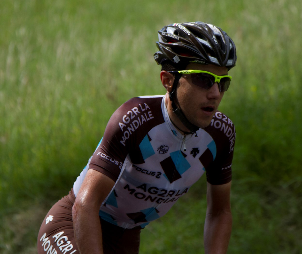 344 pozzovivo